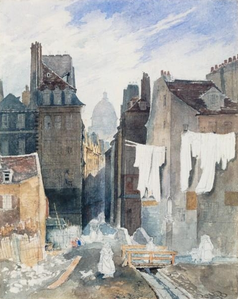 Séchage du linge à Paris, rue de Bièvre, au XIXe siècle. Dessin inachevé à la mine de plomb et aquarelle en provenance de la collection Hippolyte Destailleur.